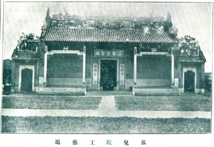 廣州孤兒院工藝實習場（黃大仙祠舊址）